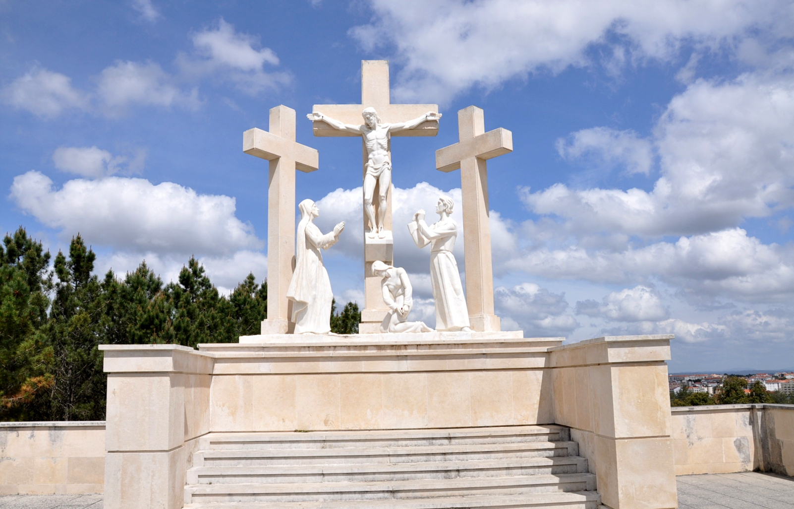 Calváro Hungaro Fatima 0628